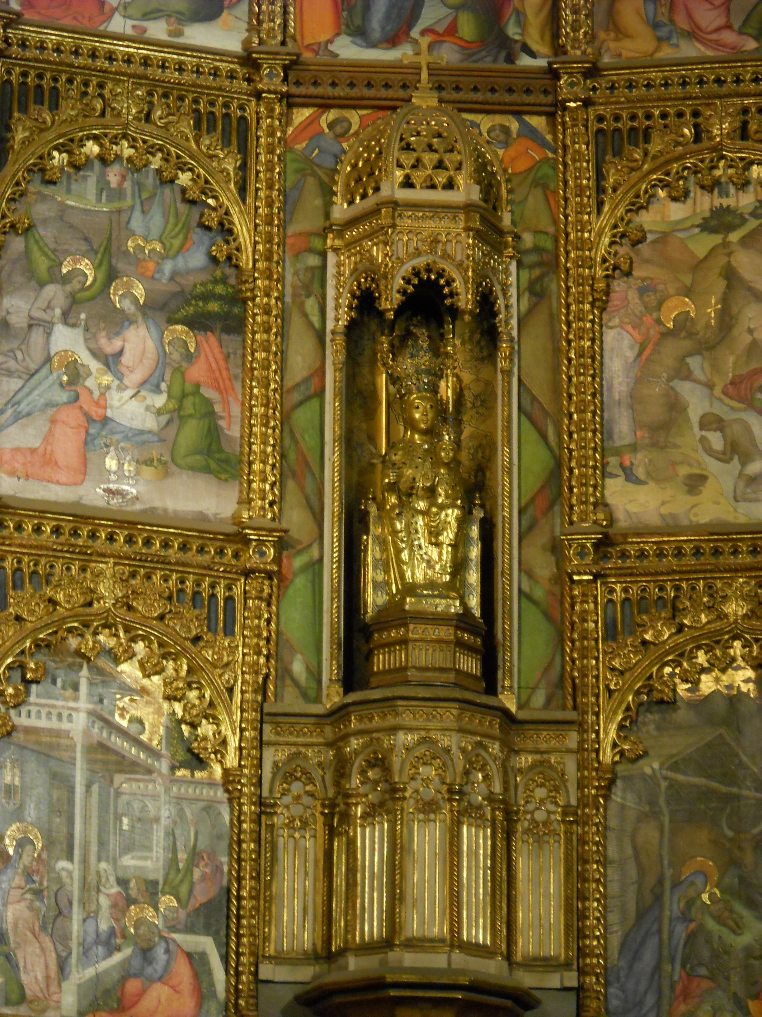 Talla de la Vírgen de la Vega, Retablo mayor, Catedral Vieja de Salamanca, España